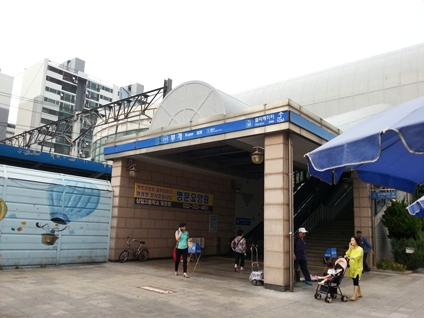 부개역 1번 출입구